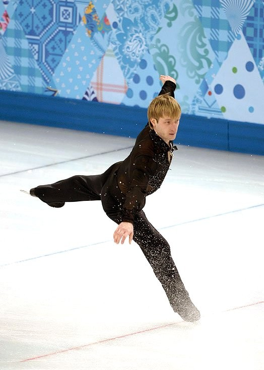 Командные соревнования по фигурному катанию во Дворце зимнего спорта «Айсберг». На льду - фигурист Евгений Плющенко, занявший первое место в произвольной программе.